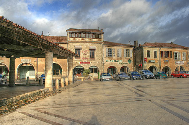 Mauvezin (Gers, France)